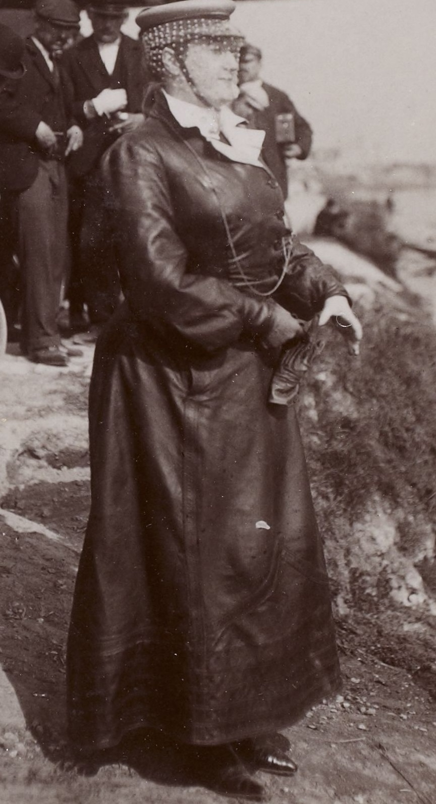 Cropped from [Collection Jules Beau. Photographie sportive] : T. 28. Année 1904 / Jules Beau : F. 5. [Canots automobiles, Juvisy, 25 septembre 1904]